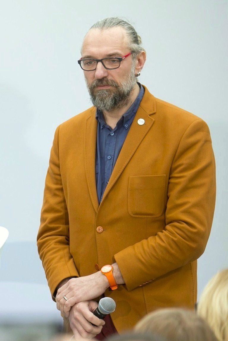 Mateusz Kijowski, informatyk, publicysta, działacz społeczny i bloger.